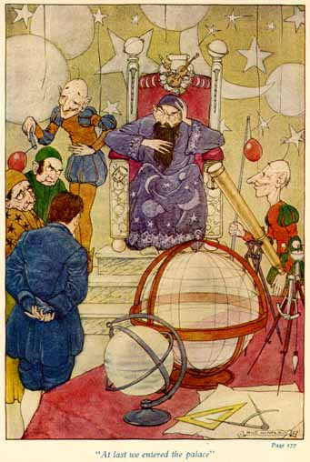 Viagens de Gulliver, Parte III, Capítulo II